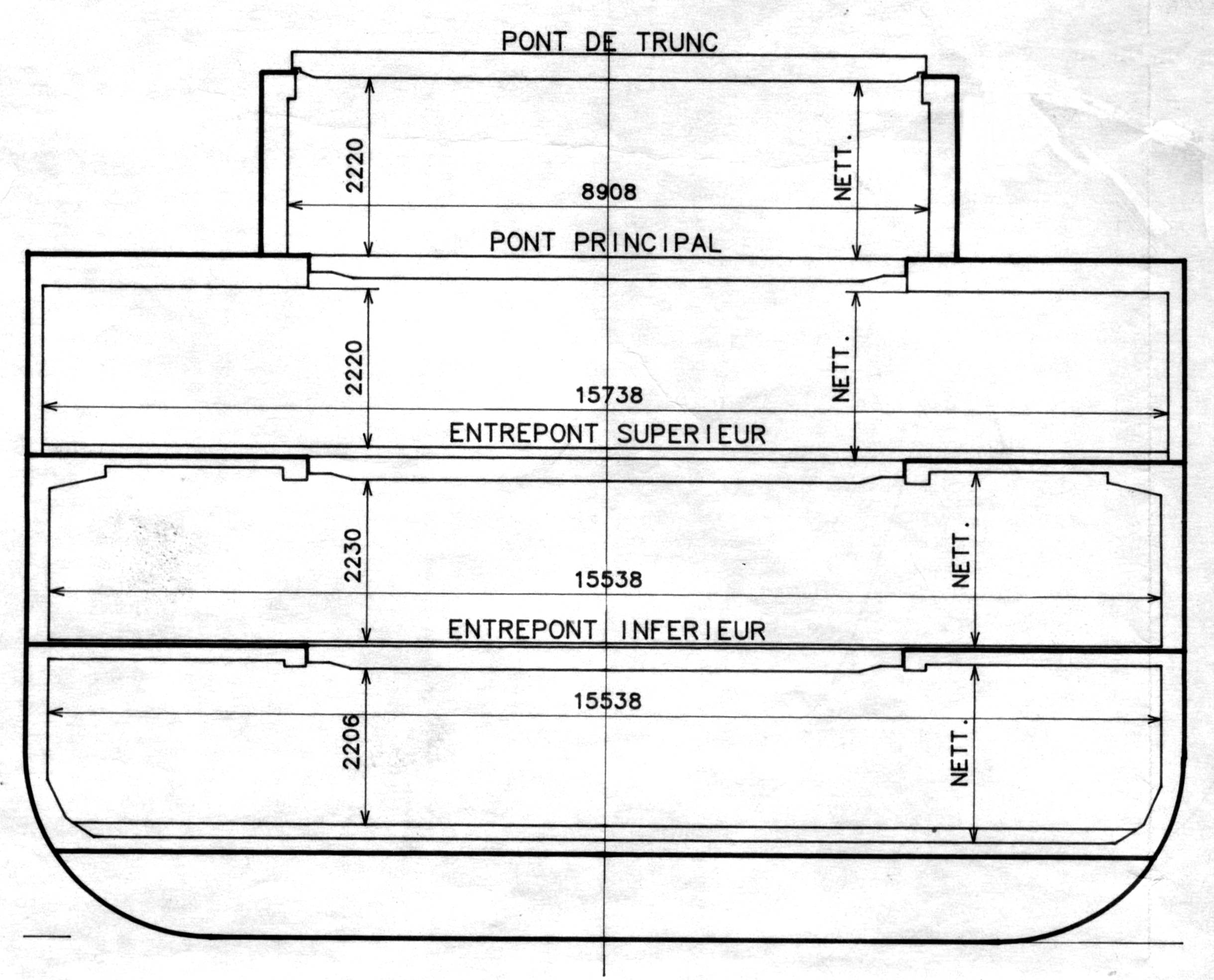 Reefer vessel section (paletts transport) Coupe au maître d'un reefer étudié pour le transport de palettes.